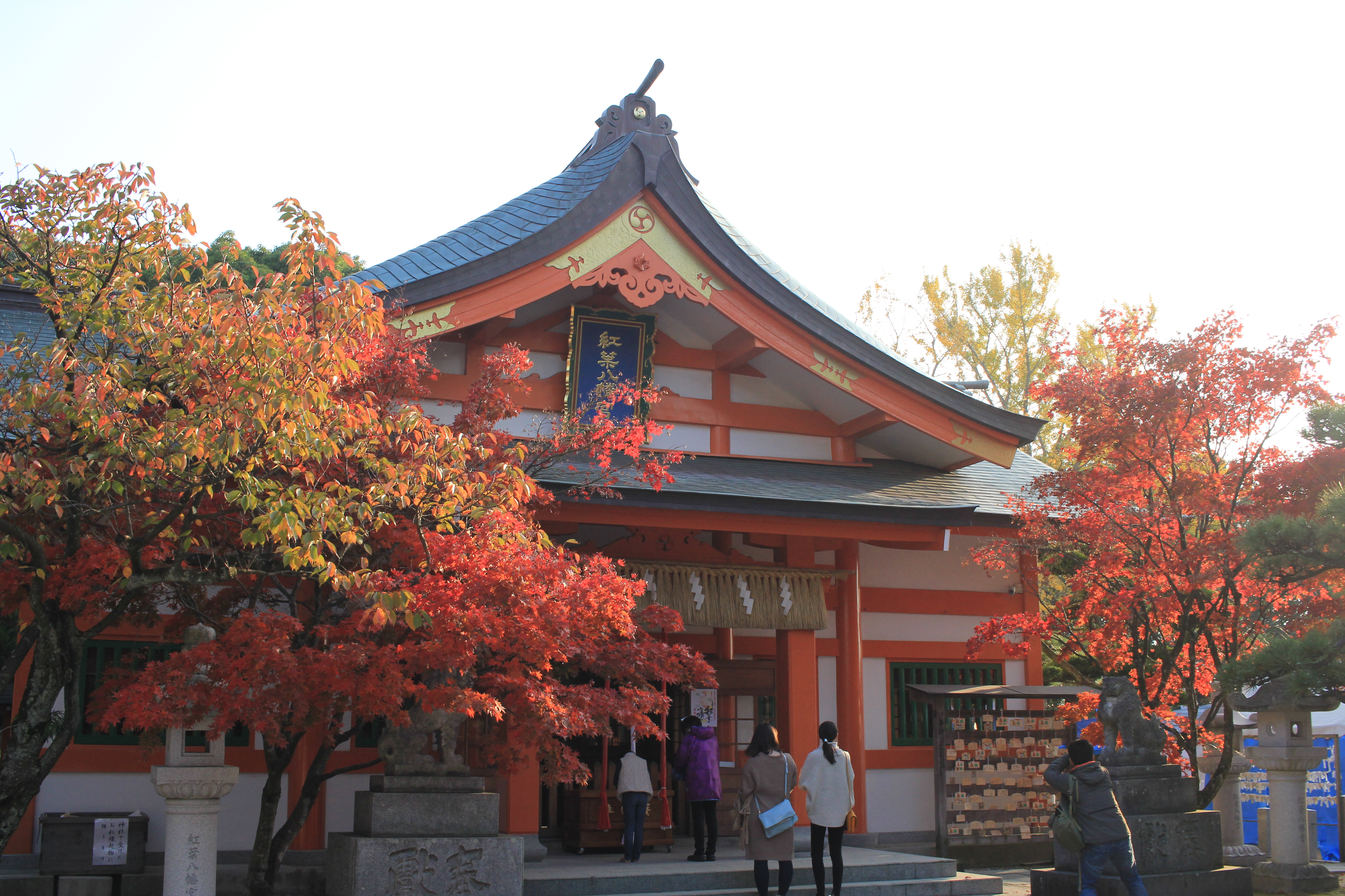 紅葉八幡宮 Canon EOS 60D